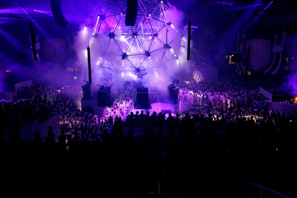 Sensation ‘Source of Light’, l’evento musicale più atteso dell’anno, è pronto a debuttare per la prima volta in Italia sabato 13 aprile 2013 all’Unipol Arena di Casalecchio di Reno. Tredicimila persone, tutte vestite rigorosamente di bianco, si stanno preparando ad assistere alla festa più spettacolare di tutti i tempi. Sei ore di musica, acrobati, ballerini, centinaia di giochi di luce ed effetti pirotecnici: questo è Sensation.